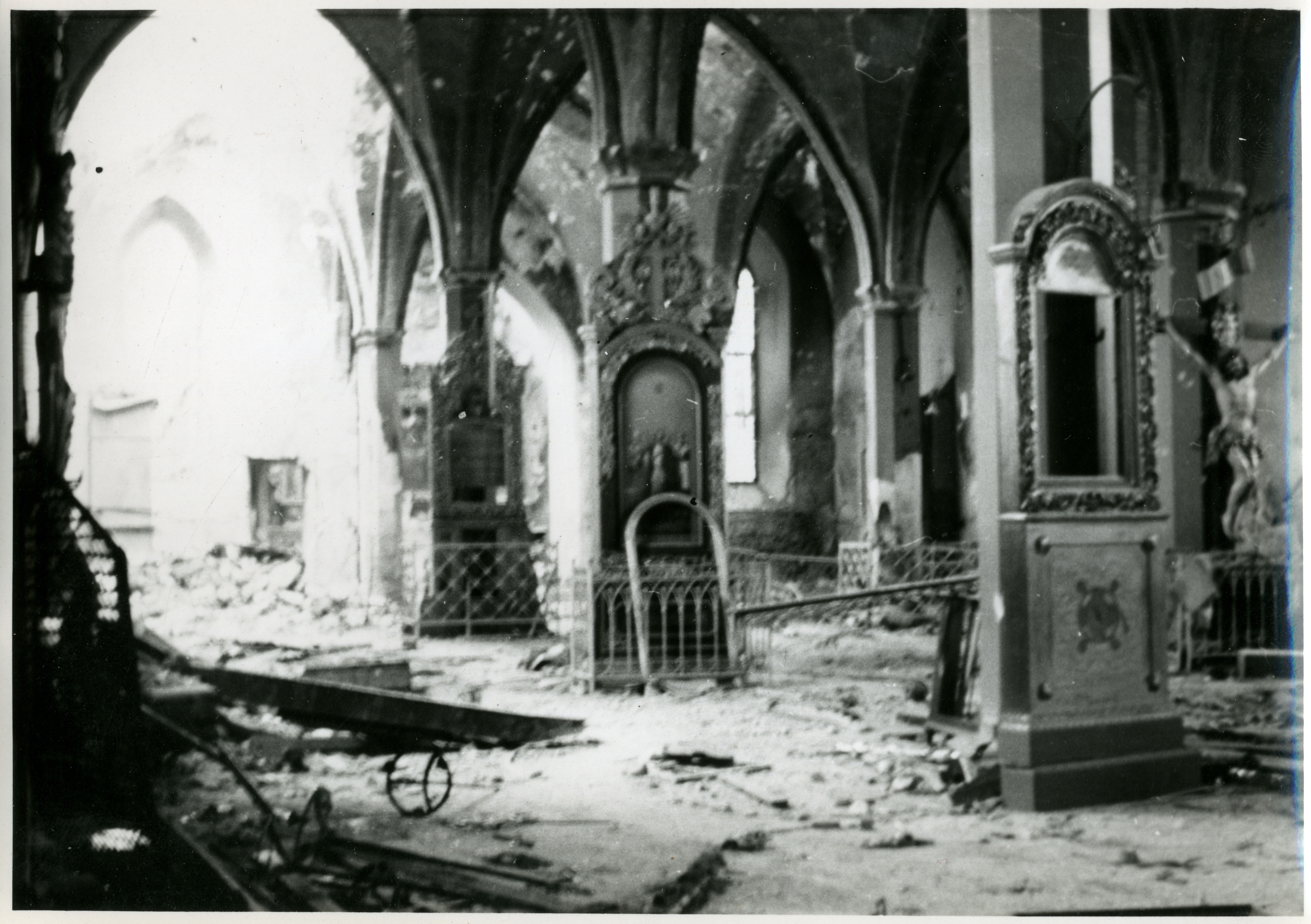 Bildet er hentet fra Arkivverket. Ødeleggelser etter kampene ved Narvafronten. Foto tilhørende landssviksak, domsnummer 2506, Oslo Politikammer. Arkivinstitusjon : Riksarkivet Arkivnavn : Landssvikarkivet Sted : Estland, Ukjent, Ukjent, Narva Emneord: Narvafronten, Ruiner, Andre verdenskrig, 2. verdenskrig, Krig Avbildet: Ukjent